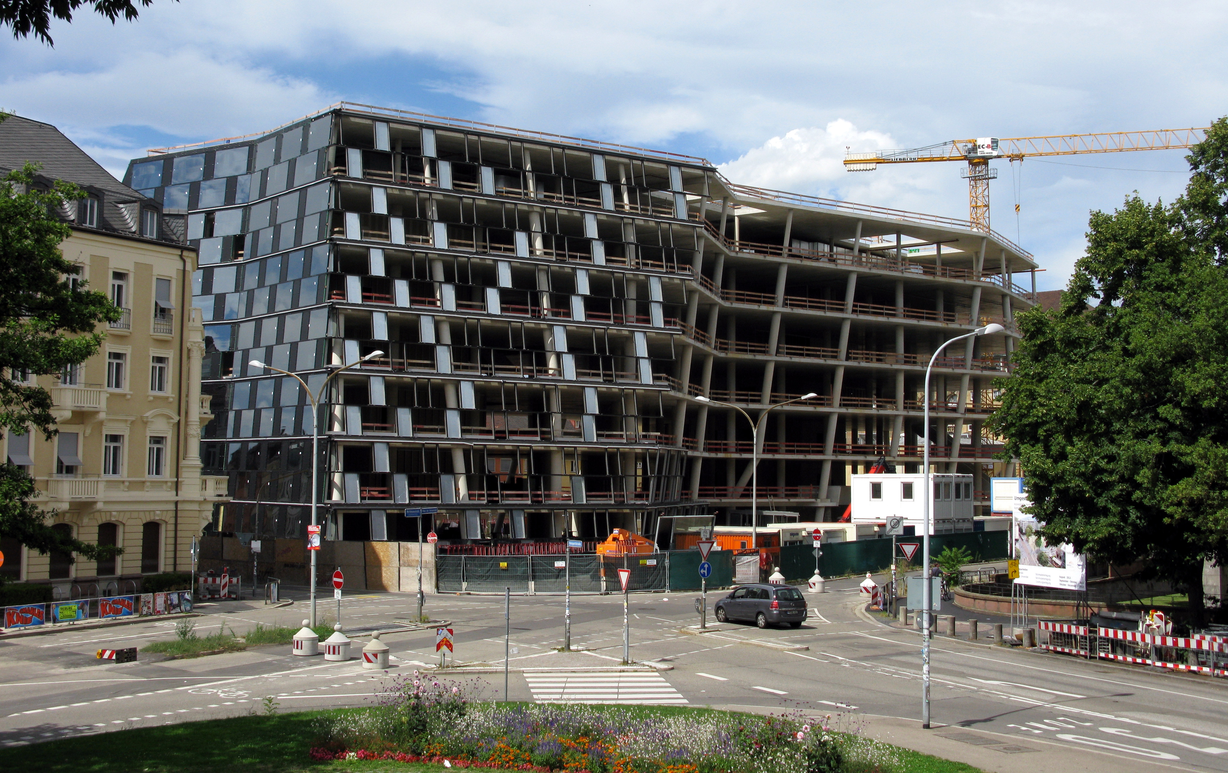 Universitätsbibliothek Freiburg, die Fassade wird montiert